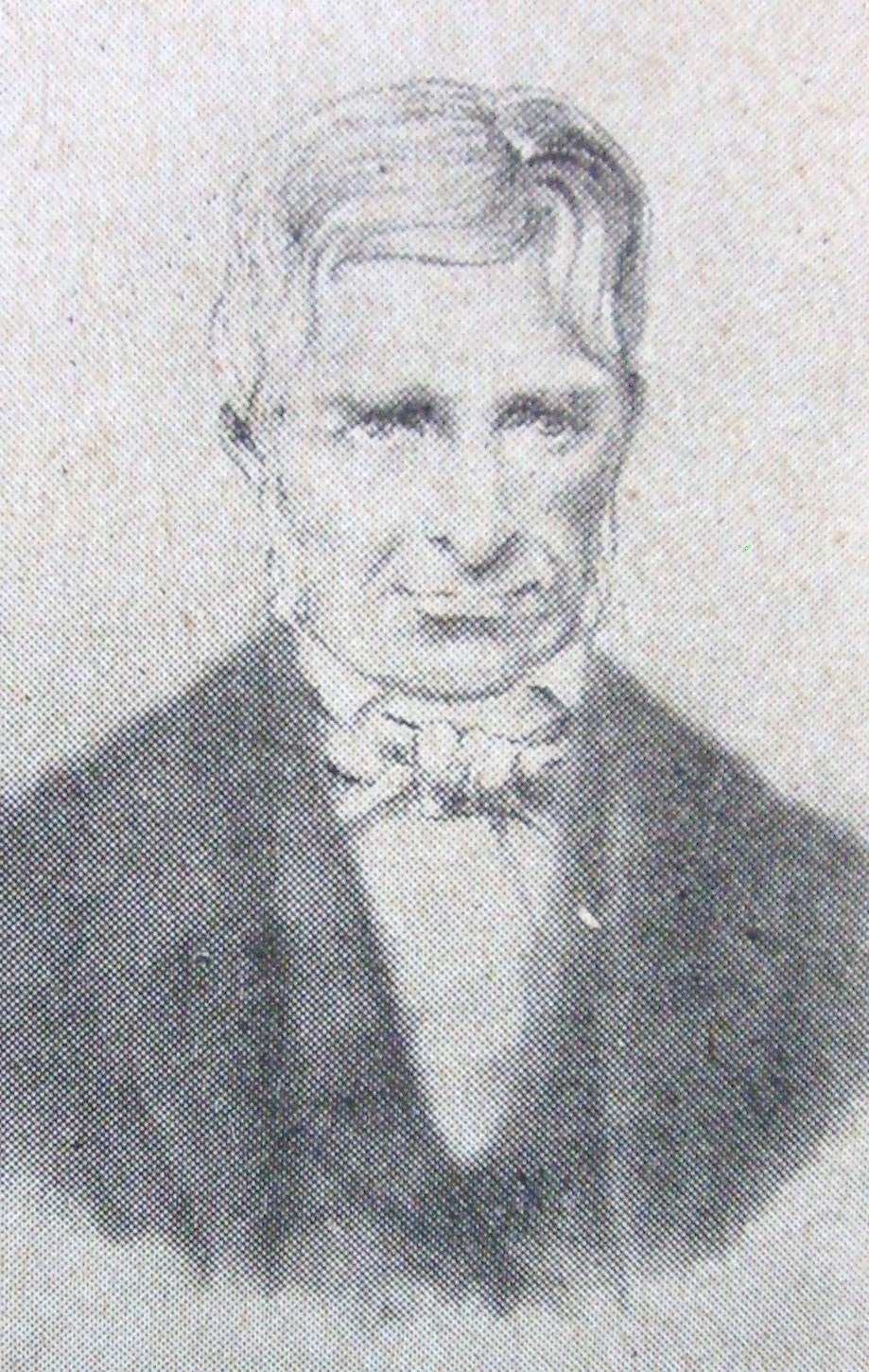 El arquitecto poblano José Manzo